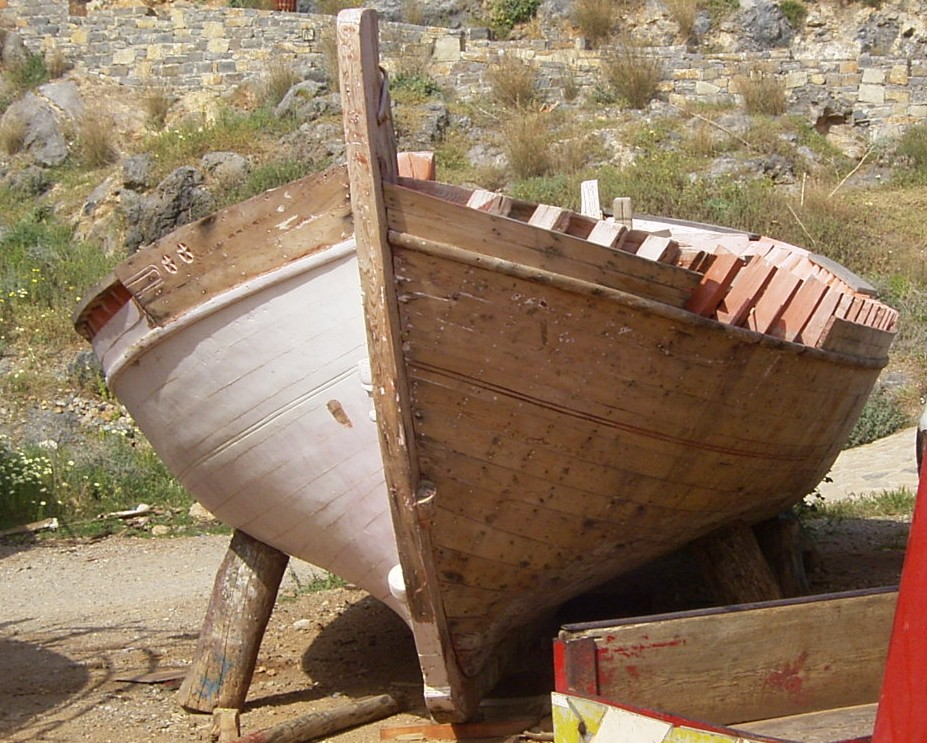 Altes kretisches Fischerboot zur Restaurierung an Land.